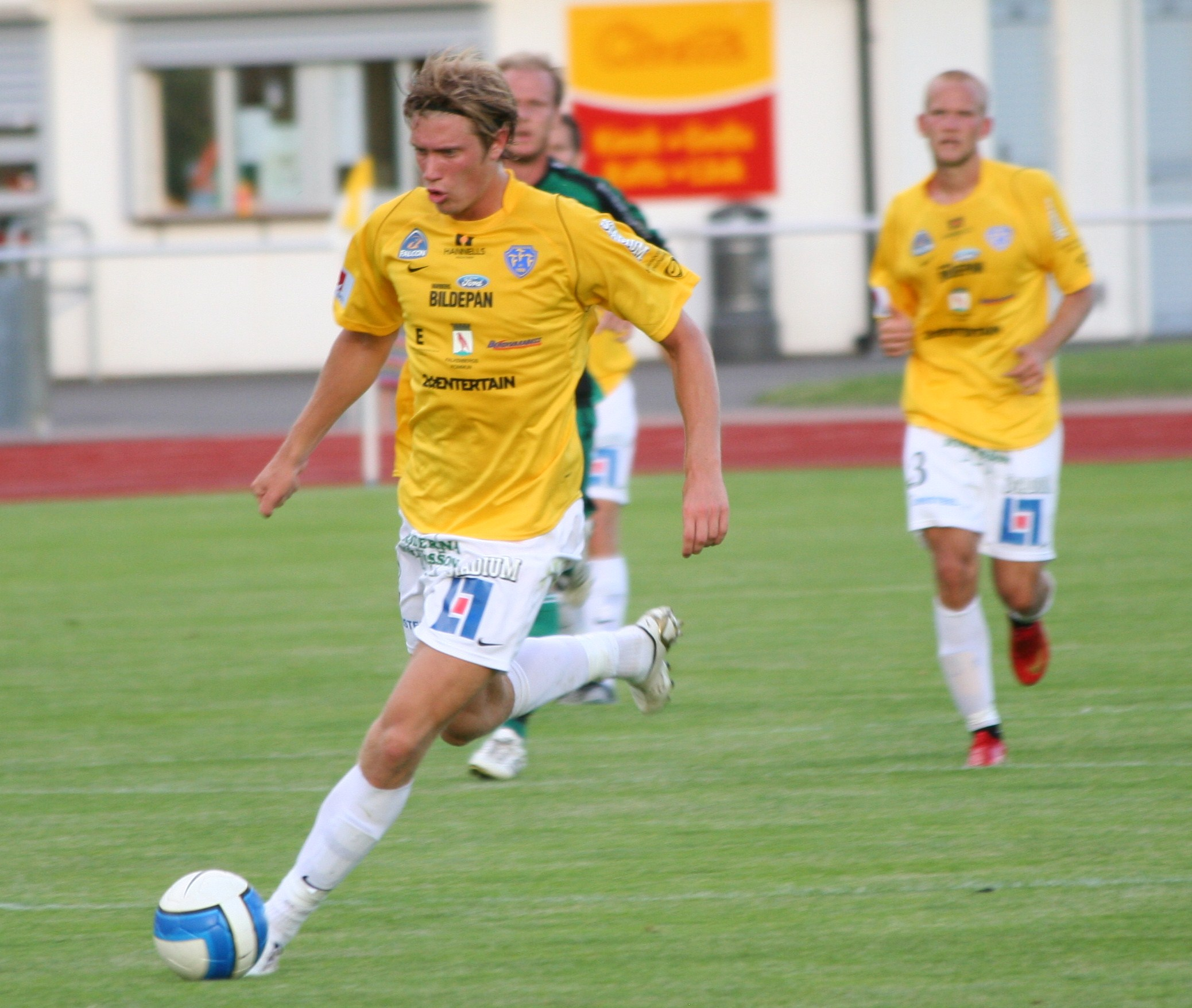 Tobias Holmqvist, Falkenbergs FF 2008